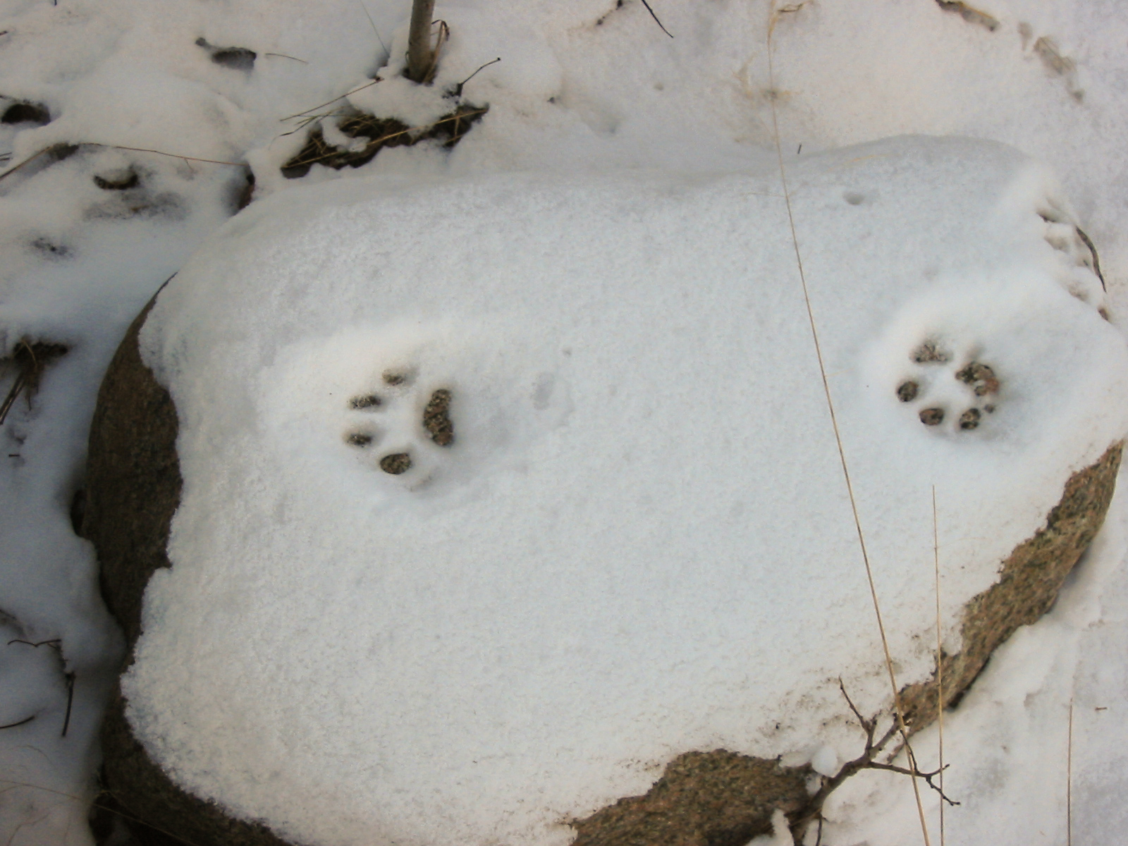 Luchs-Fährte im Schnee, Januar 2005, Värmland, Schweden Common names: Eurasian Lynx Eurasischer Luchs